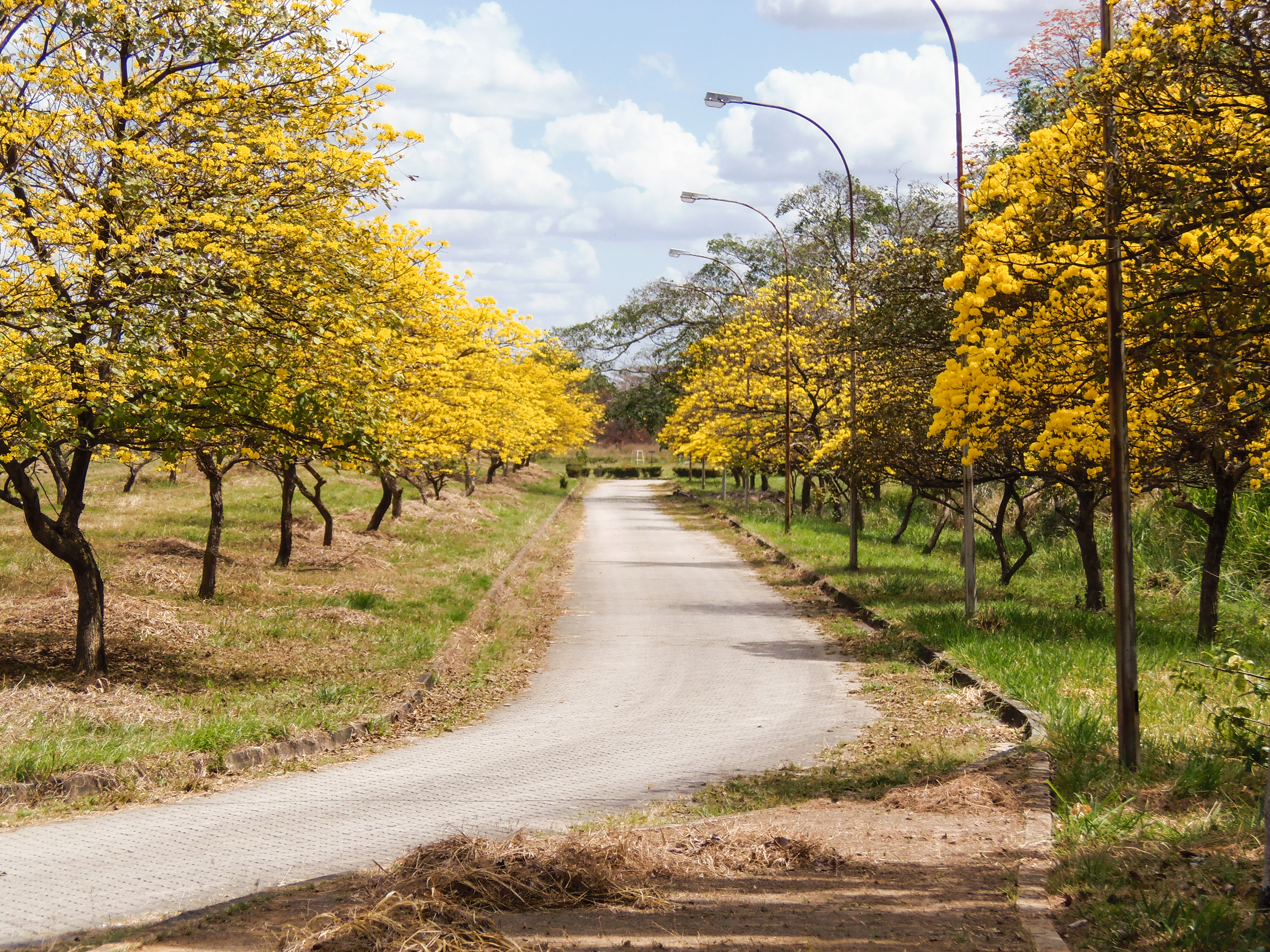 Jardín Botánico de la Unellez